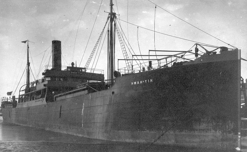 Lodní transport cca 1300 legionářů z Vladivostoku do Evropy (v pořadí s číslem 16) se odehrál v období od 10. ledna 1920 do 26. února 1920. Transportní lodí byla Silesia (původně japonská loď Hvan-Yim, resp. Hvah-Yih) s celkem 34 členy posádky (30 námořníků, kapitán a tři lodní důstojníci). (Loď byla 120 m dlouhá a 14,5 m široká). Transport proběhl po trase: Vladivostok, Hongkong, Suezský průplav, Terst (26. února 1920) a následně po železnici směr Linz, Praha a Litoměřice (1. března 1920).